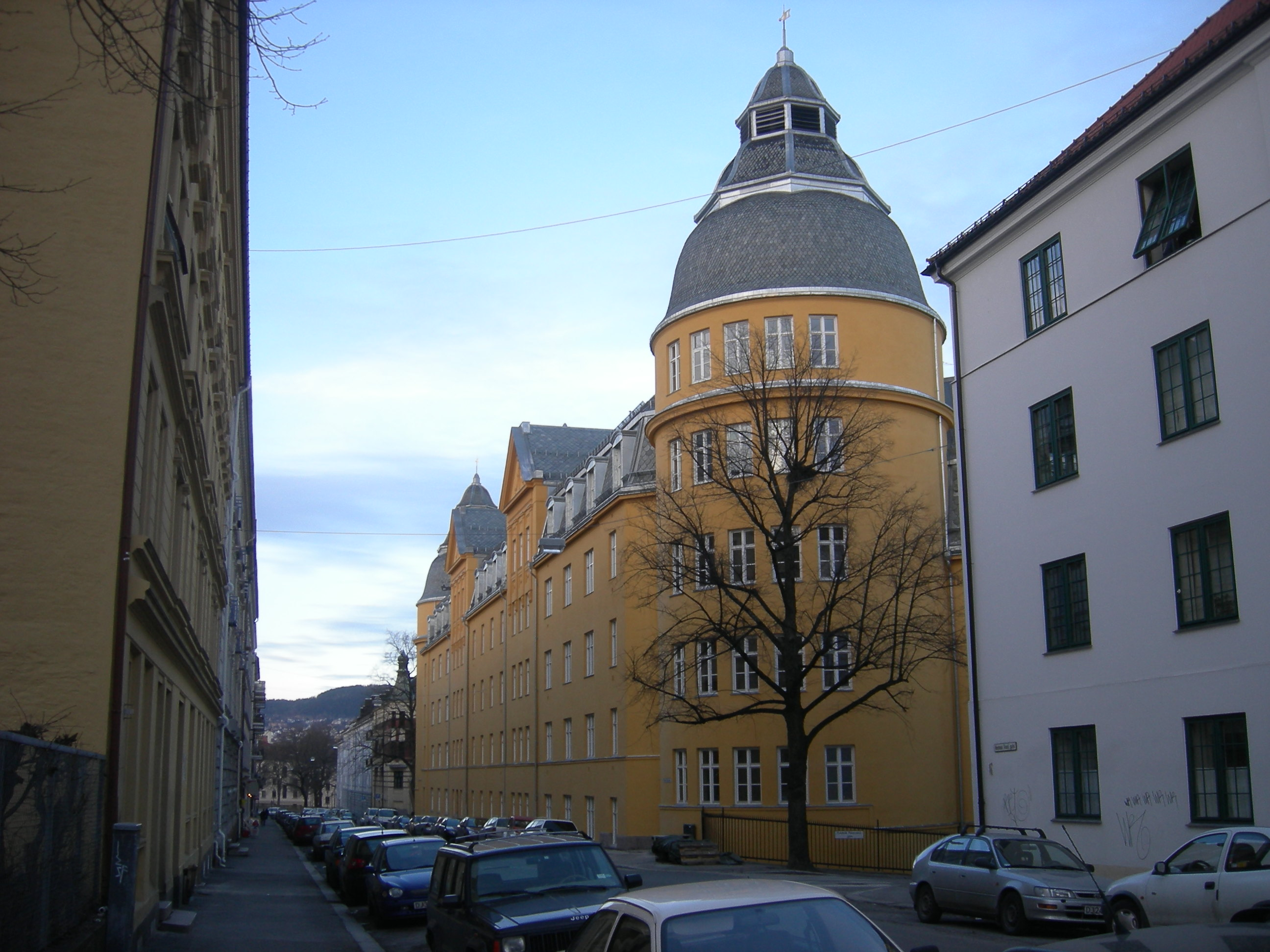 Ila skole, Oslo, sett fra Herman Foss' gate